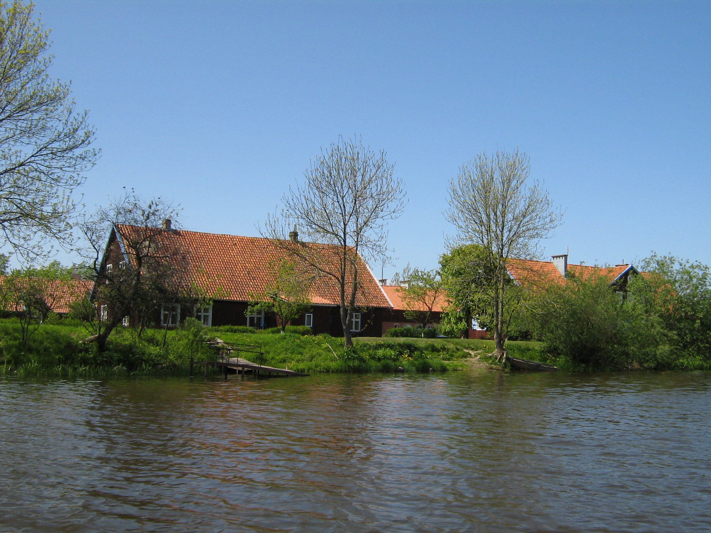 Mingė village